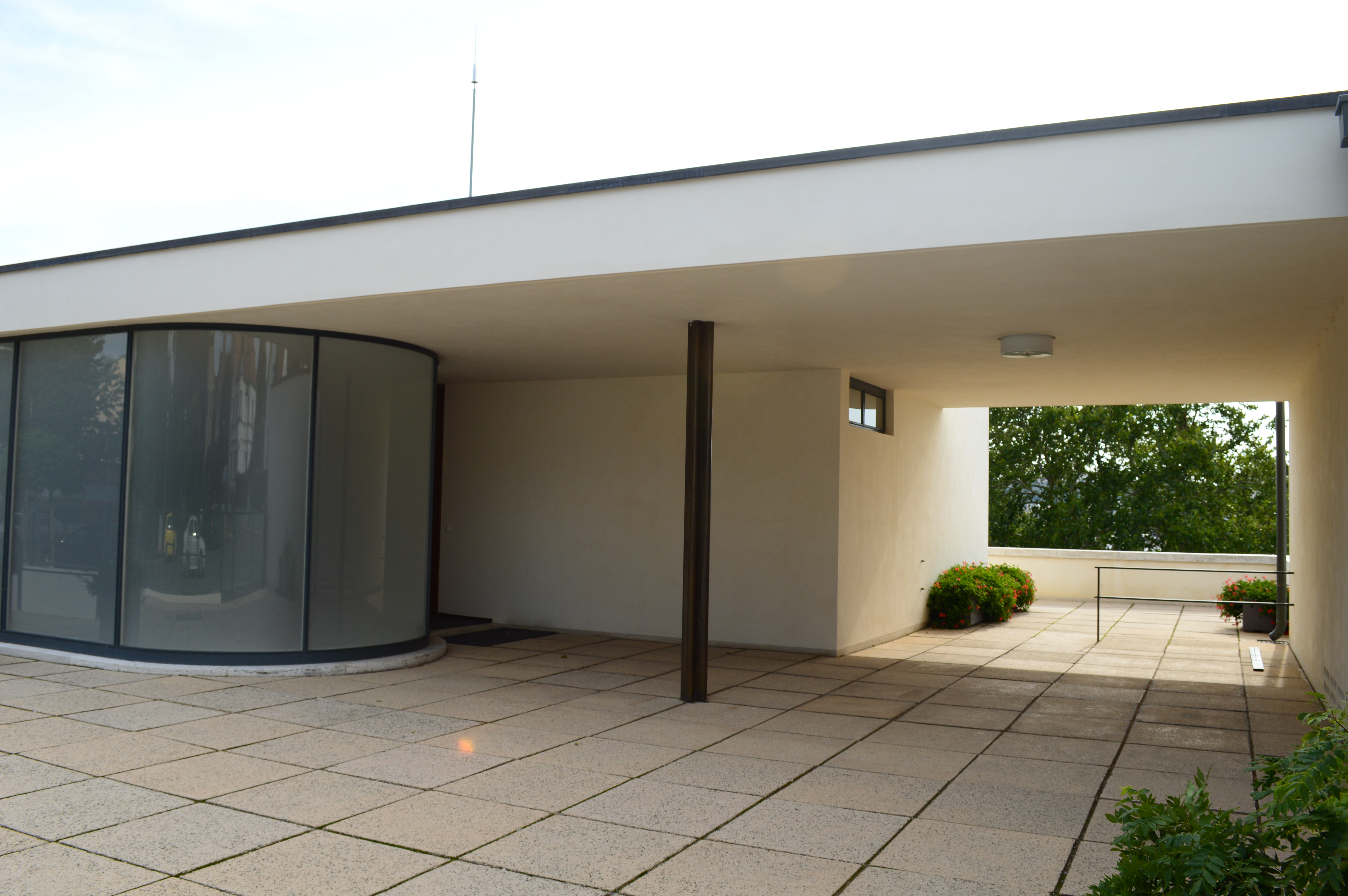 exteriér Vila Tugendhat